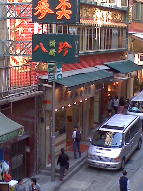 Mak's Noodles